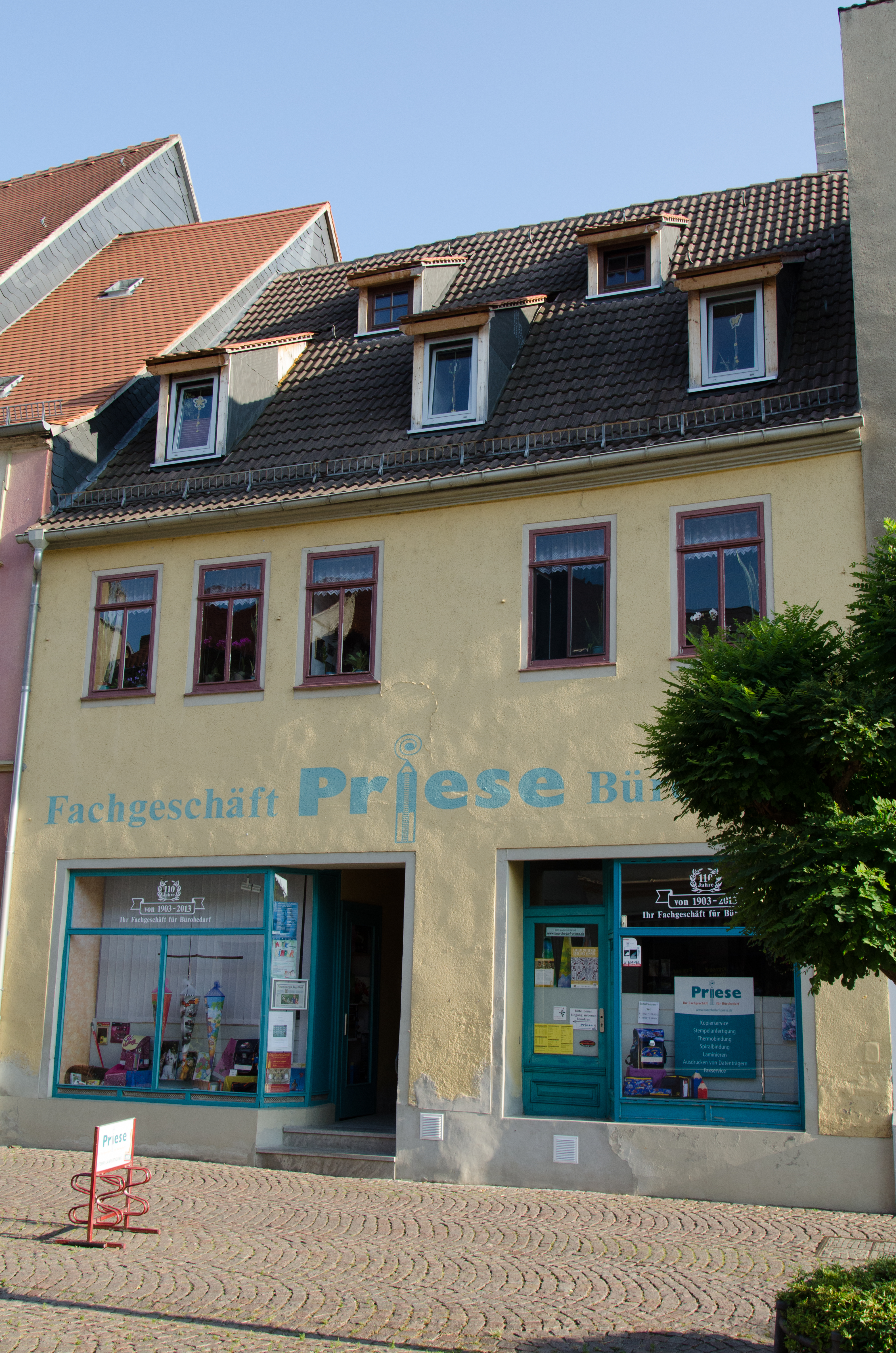 Naumburg, Salzstraße 23